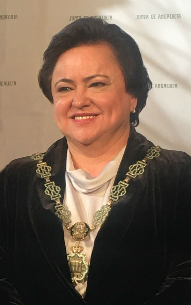 Toma de posesión María Jesús Gallardo Castillo como presidenta del Consejo Consultivo de Andalucía